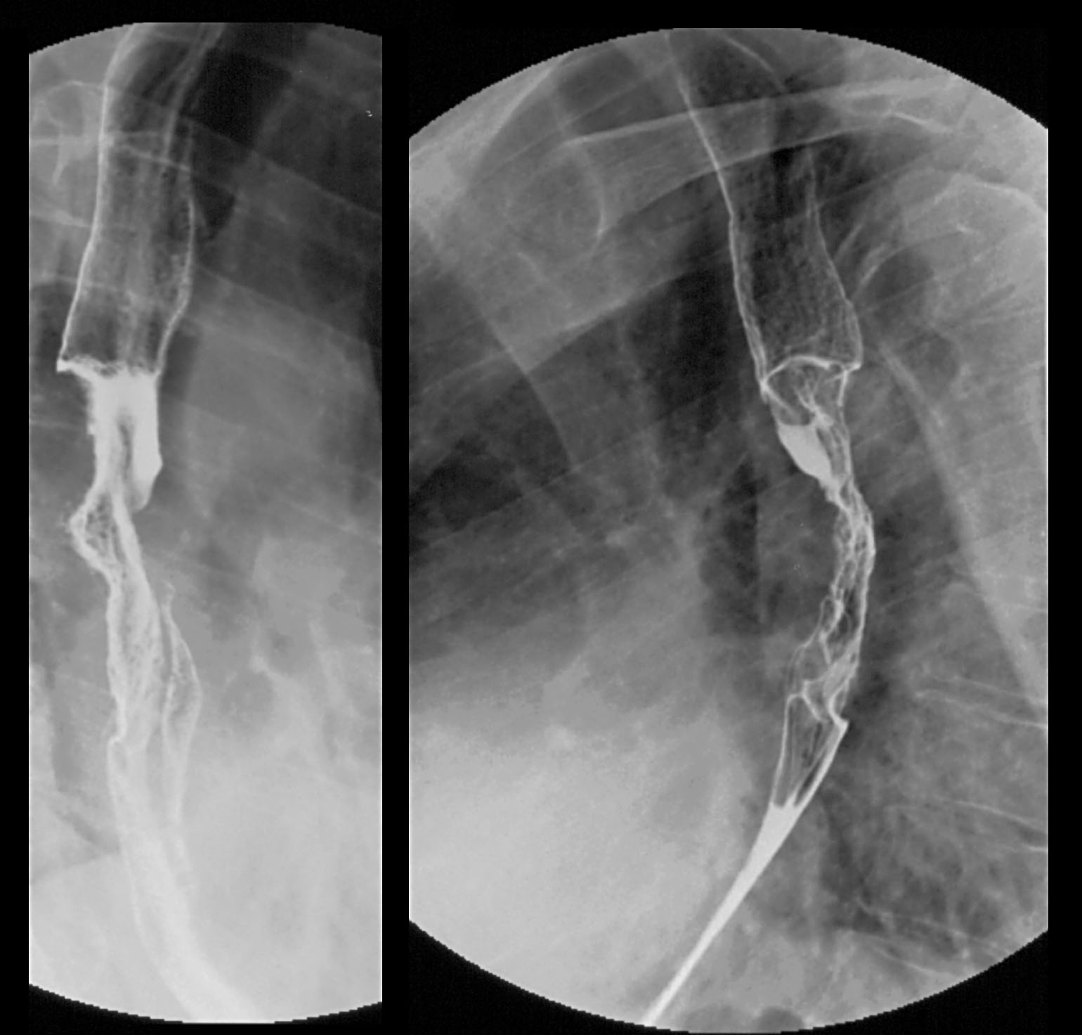 Breischluckuntersuchung bei Plattenepithelkarzinom des Ösophagus. Abgesehen von der für ein Adenokarzinom untypisch hohen Lage gibt in dieser Untersuchung keine Unterscheidungskriterien zu diesem. Bei ektoper Magenschleimhaut ist auch beim Adeno-CA eine hohe Lage möglich.